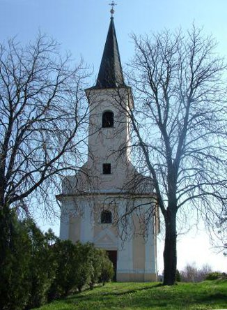 Szent Anna Templom Ny-ti homlokzata Boncodfölde 2008. március 16. Készítette: Fehér Legato K.